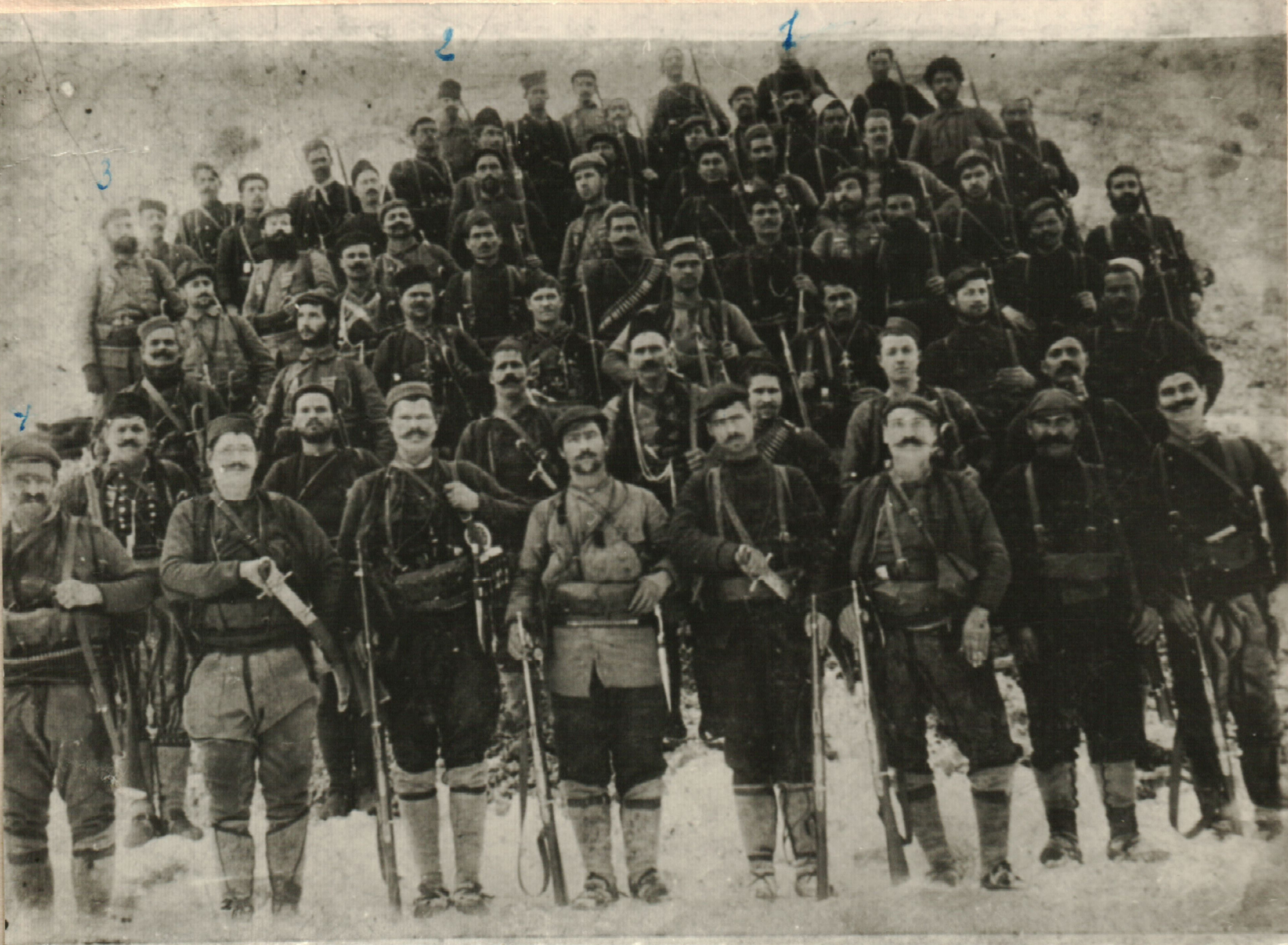 Сборните чети на ВМОРО при пещерата Капе, село Каракьой, Серско. Описание на снимката от присъствалия Георги Баждаров: „На първата редица, Демирхисарската чета, от ляво на дясно: войводата Дядо Илия (едната му ръка не е излязла), Георги Чалъков, Георги Башлиев (и тримата от Кърчово), Георги Баждаров от Горно Броди, Иван Гърчето от Мелник, Константин Кюров от Крушово, Никола Карев от Горно Броди. Вторият ред: Атанас Тешовалията, войвода на Неврокопската чета, Стоян Филипов от с. Старчища, секретар на четата, третия, четвъртия и петия не помня; Георги Моаджирчето, Иван Даскала - Копаран-чауша. Третият ред: Георги Радев, серски войвода, от Горно Броди, Михаил Чаков от Гуменджа, секретар на четата, третият от Савек, не помня името му, четвъртия също не помня, петият Ангел Дончев от Кулата, шестия не помня, седмият Таската - Атанас Спасов, последния не помня. Четвъртият ред: Димитър Гущанов, драмски войвода, от Старчища по баща, майка му от Крушово, Димитър Кашиналията от с. Кашина, Мелнишко, на другите не помня имената. Петият ред: Яне Сандански, мелнишки войвода от с. Влахи, Спиро Петров от Прилеп, Георги Спанчовалията от с. Спанчово, Мелнишко, Петър Милев, Андрей Кезепов, Георги Скрижовски. Шестият ред: Георги Куслев, поройски войвода, от Кукуш, другите не помня. Седмият ред: Станиш Наков и Кара Васил, кукушлии, от четата на Гоце. От същата четата помня Карчо - голата с къдрава коса глава в края на седмата редица; Димитър Кирлиев, през един след Гоце, Пею Яворов с черната капа и черната брада към края на предпоследната редица. Гоце едва се познава най-отзад.“